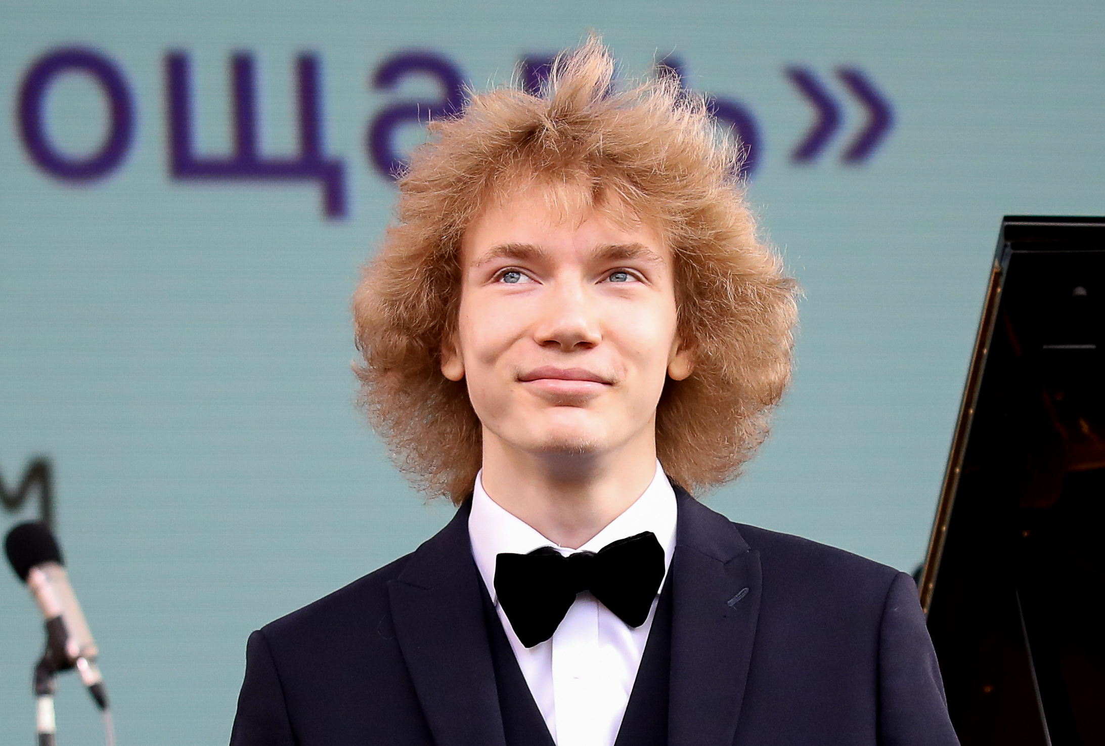 Пианист Иван Бессонов на книжном фестивале «Красная площадь».